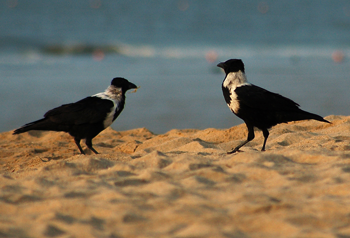 Corvus torquatus. 厦门环岛路